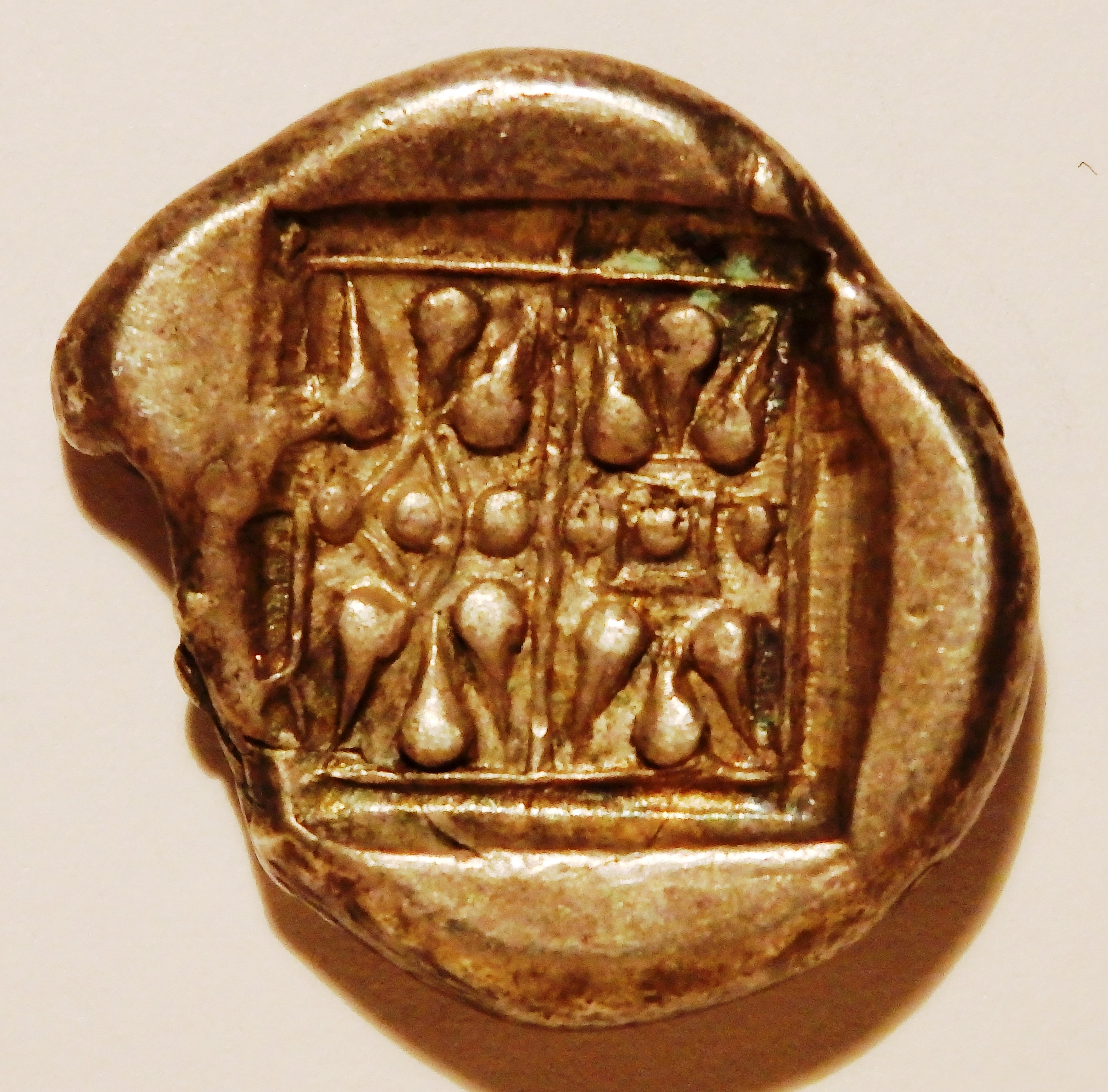 Stater aus Korkyra, stilisierte Doppelblüte im Quadrat, ca. 475-450 v. Chr. geprägt, Szaivert/Sear Nr. 2281